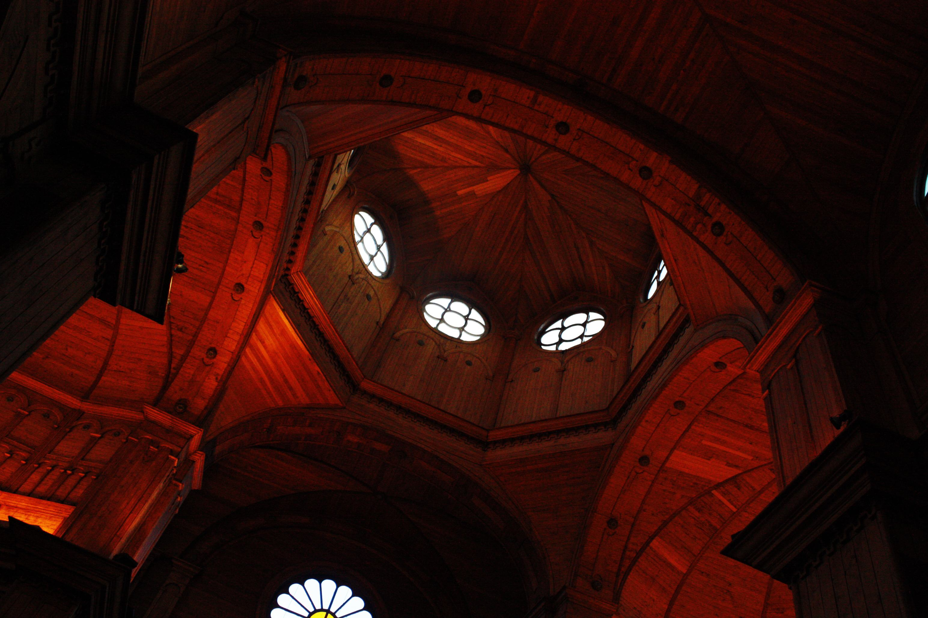 Iglesia de San Francisco de Castro This is a photo of a national monument in Chile: 165